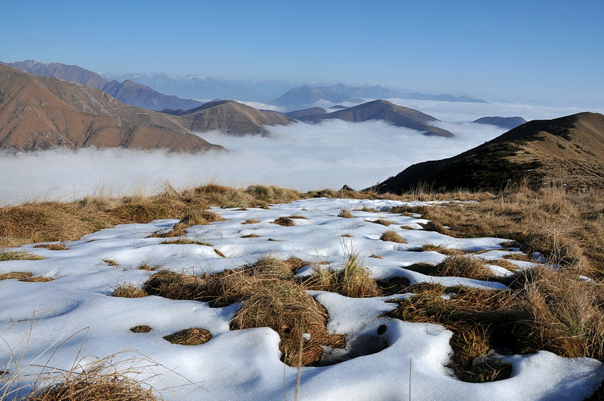 Pian Cavallone